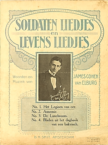 Op de omslag staan vier liedjes genoemd, twee soldatenliedjes en twee levensliedjes plus een foto van de dichter/componist/zanger